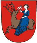 Znak města